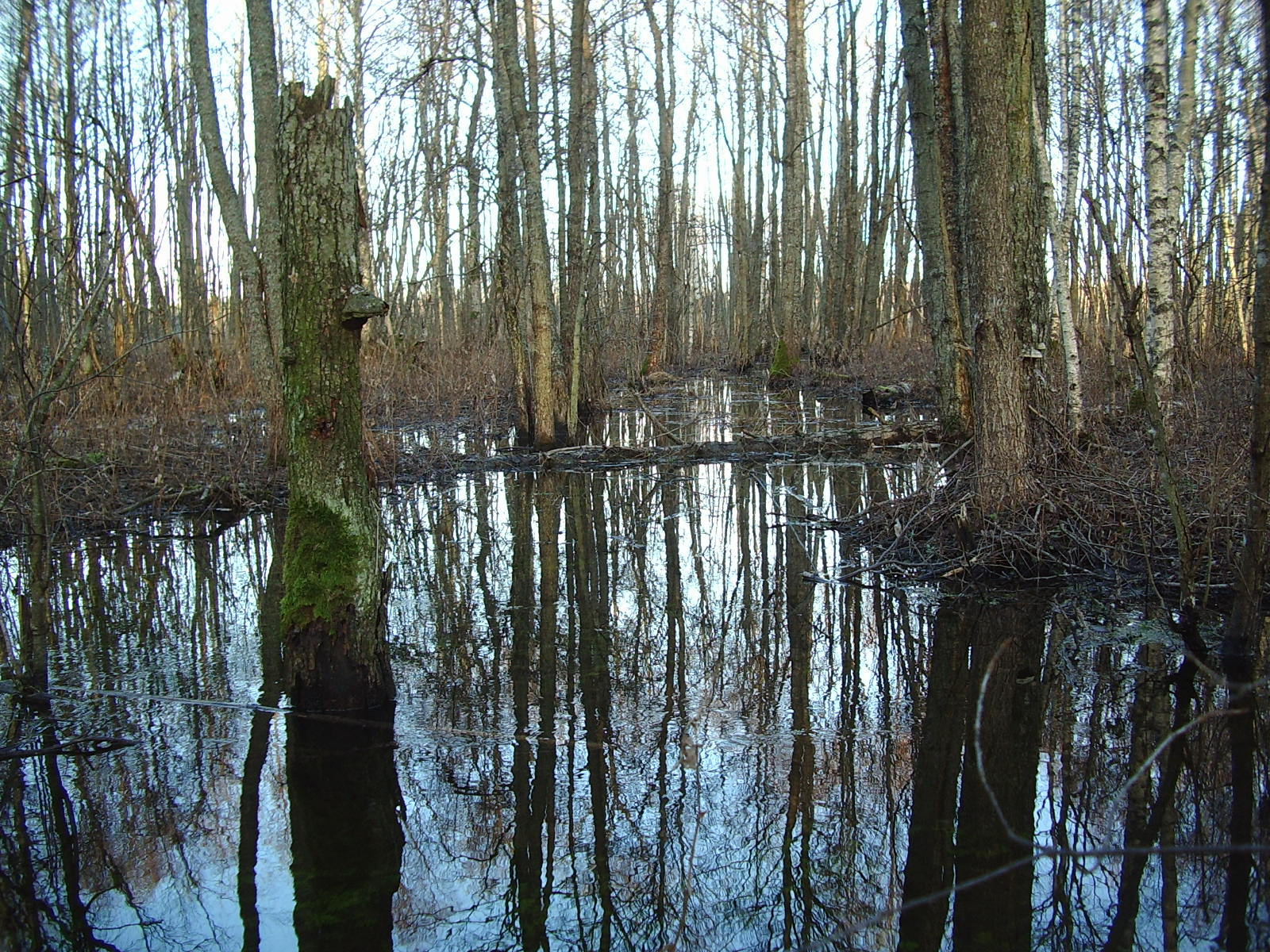 Maadevahe jõgi